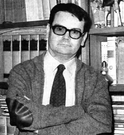 Italian director Massimo Scaglione